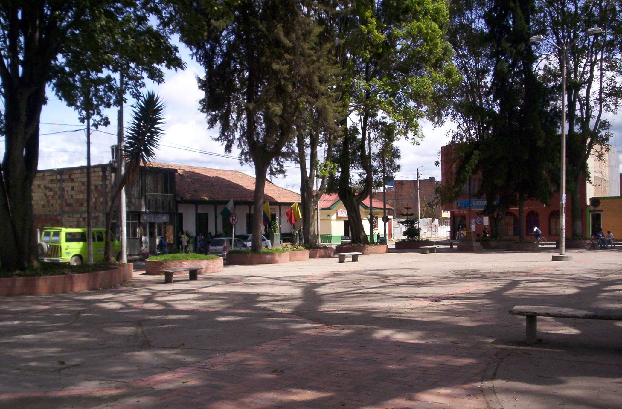 Plaza fundacional de Engativá, Bogotá, Colombia